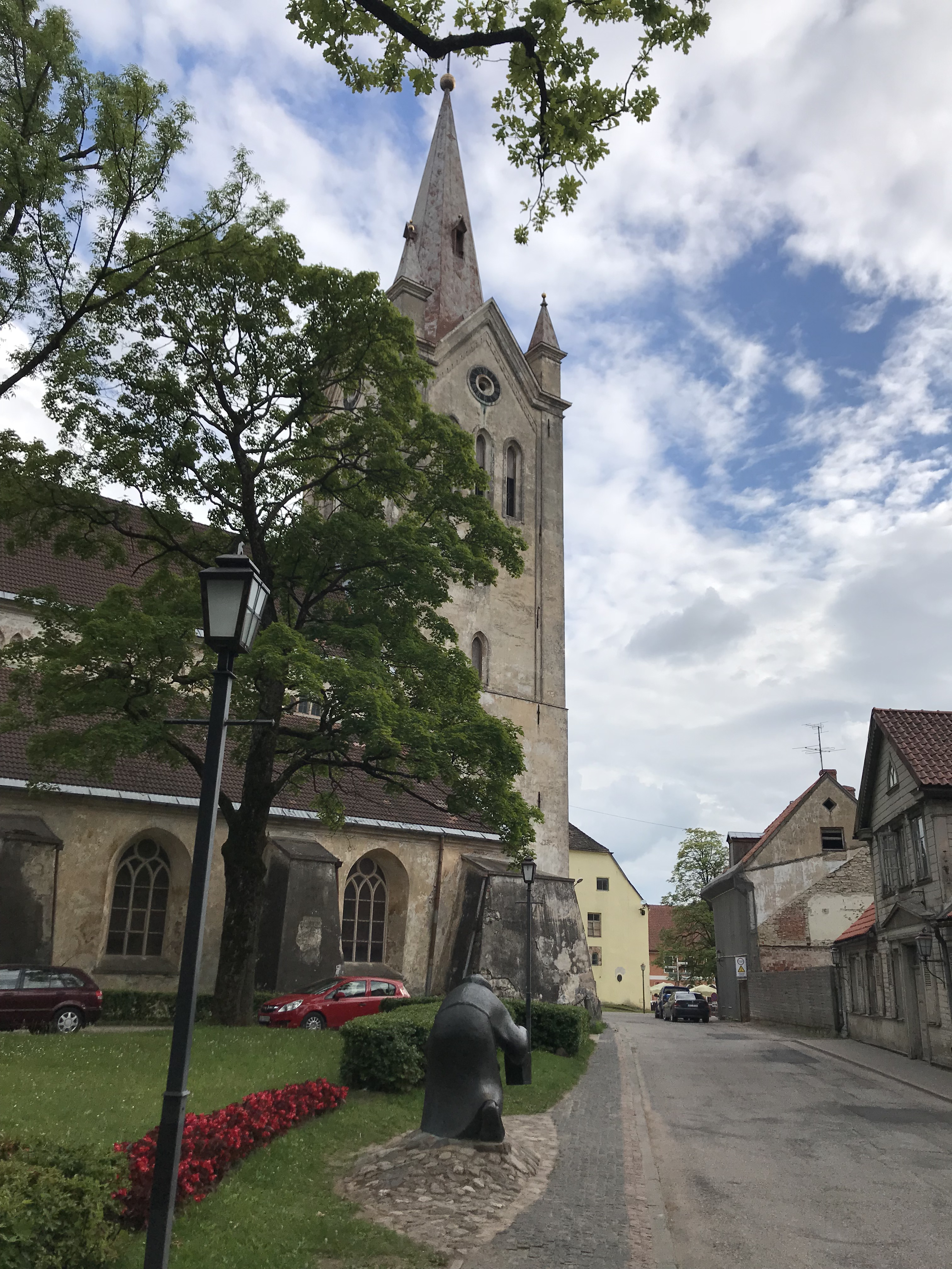 Cēsis xullo 2018